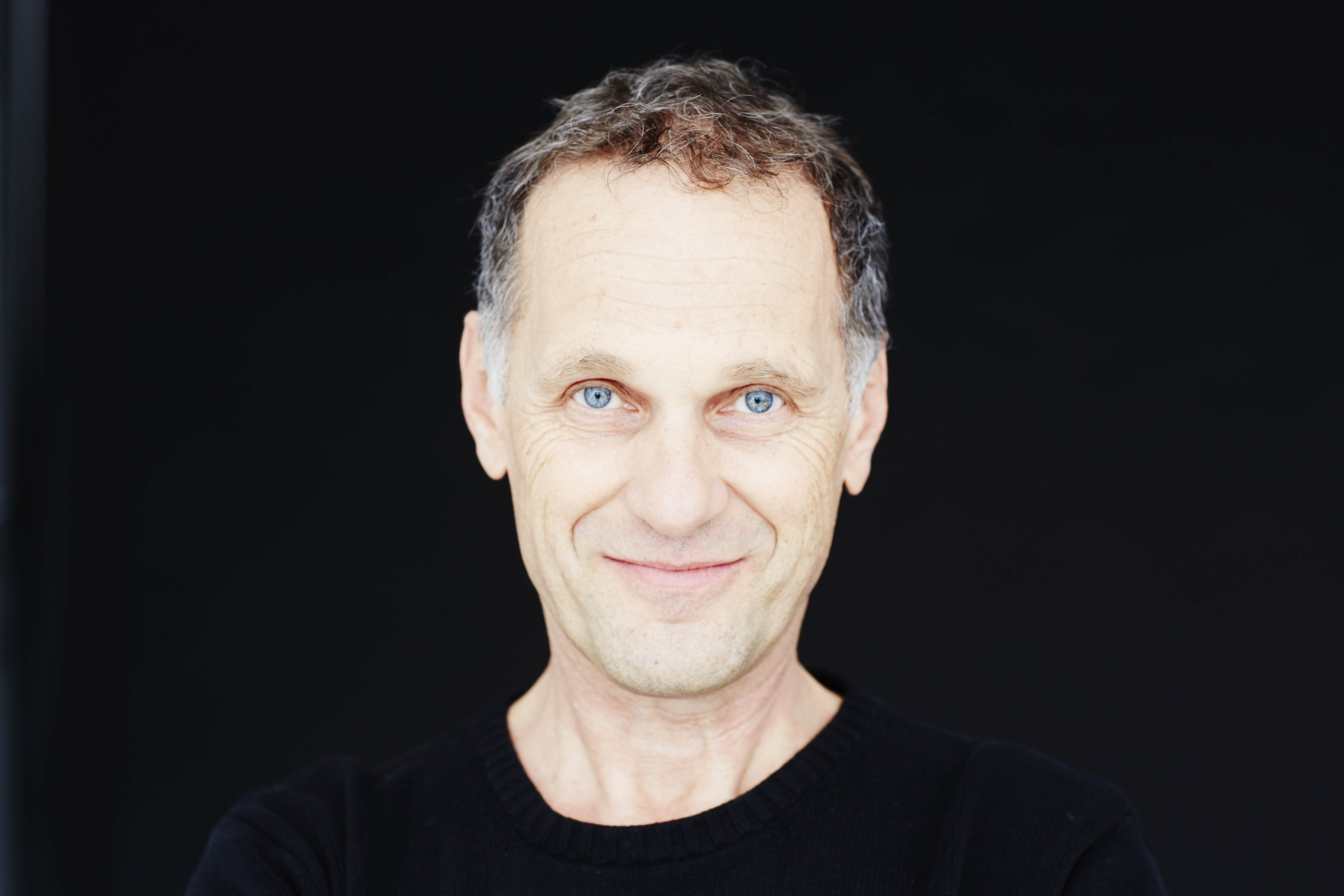 Peter Raffalt 2015 in Wuppertal